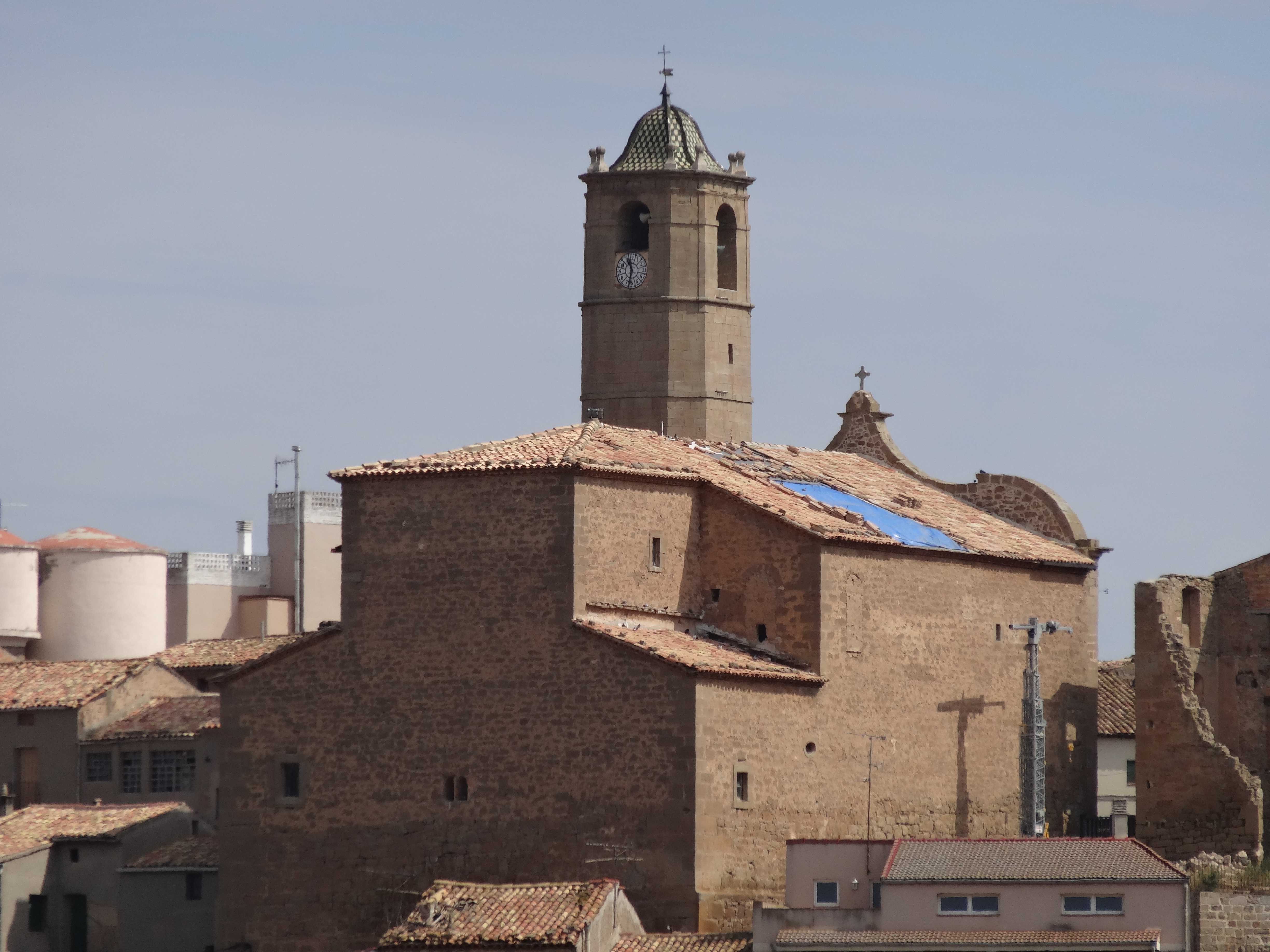 Església de Sant Pere de Puigverd d'Agramunt